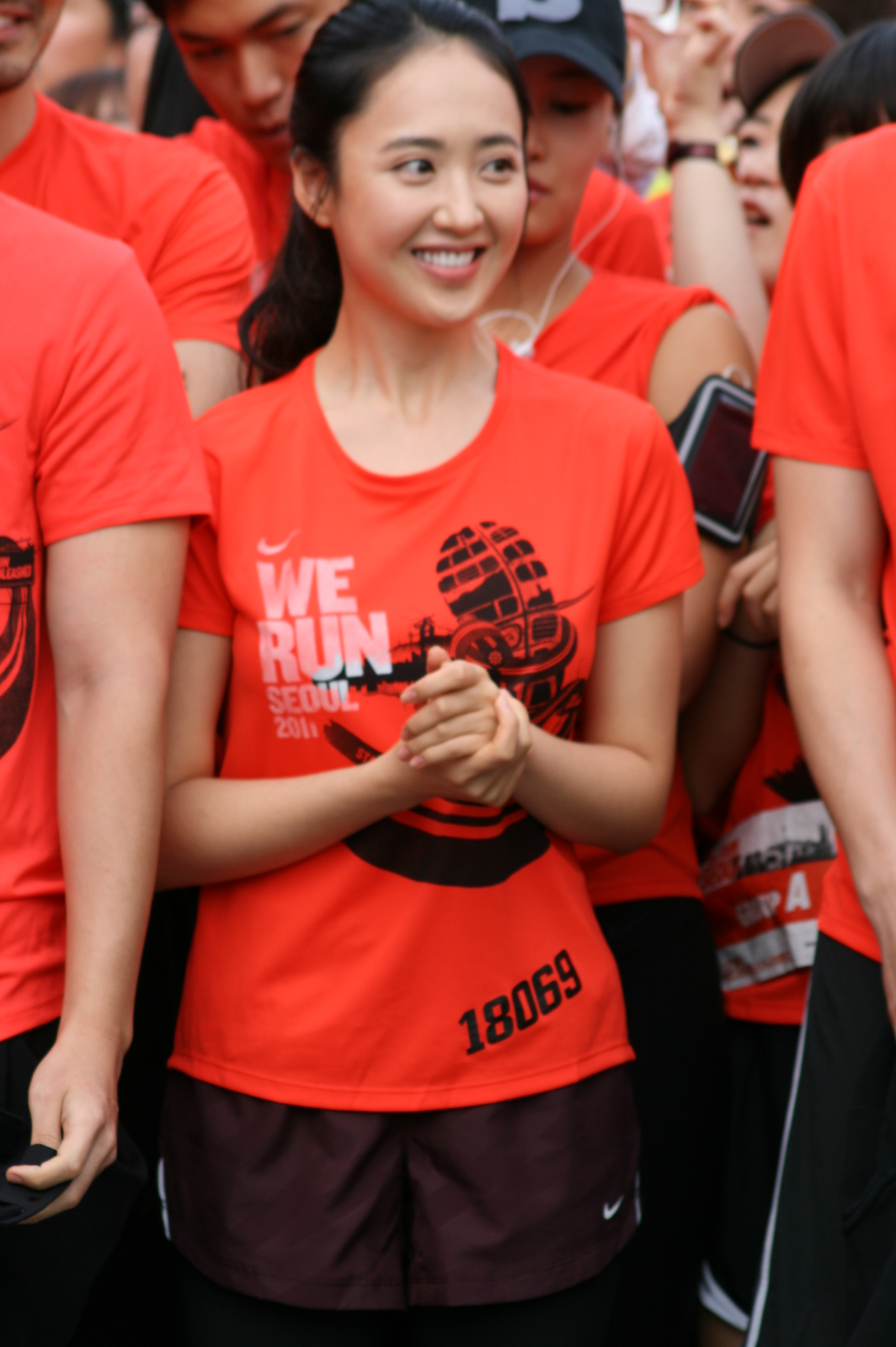 2011년 10월 23일 서울 광화문광장에서 열린 "나이키 위 런 서울 텐케이"(NIKE WE RUN SEOUL 10K)에 참가한 김민정.